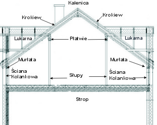 Dach krokwiowo - płatwiowy